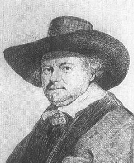 Jan van Goyen - portrét malíře